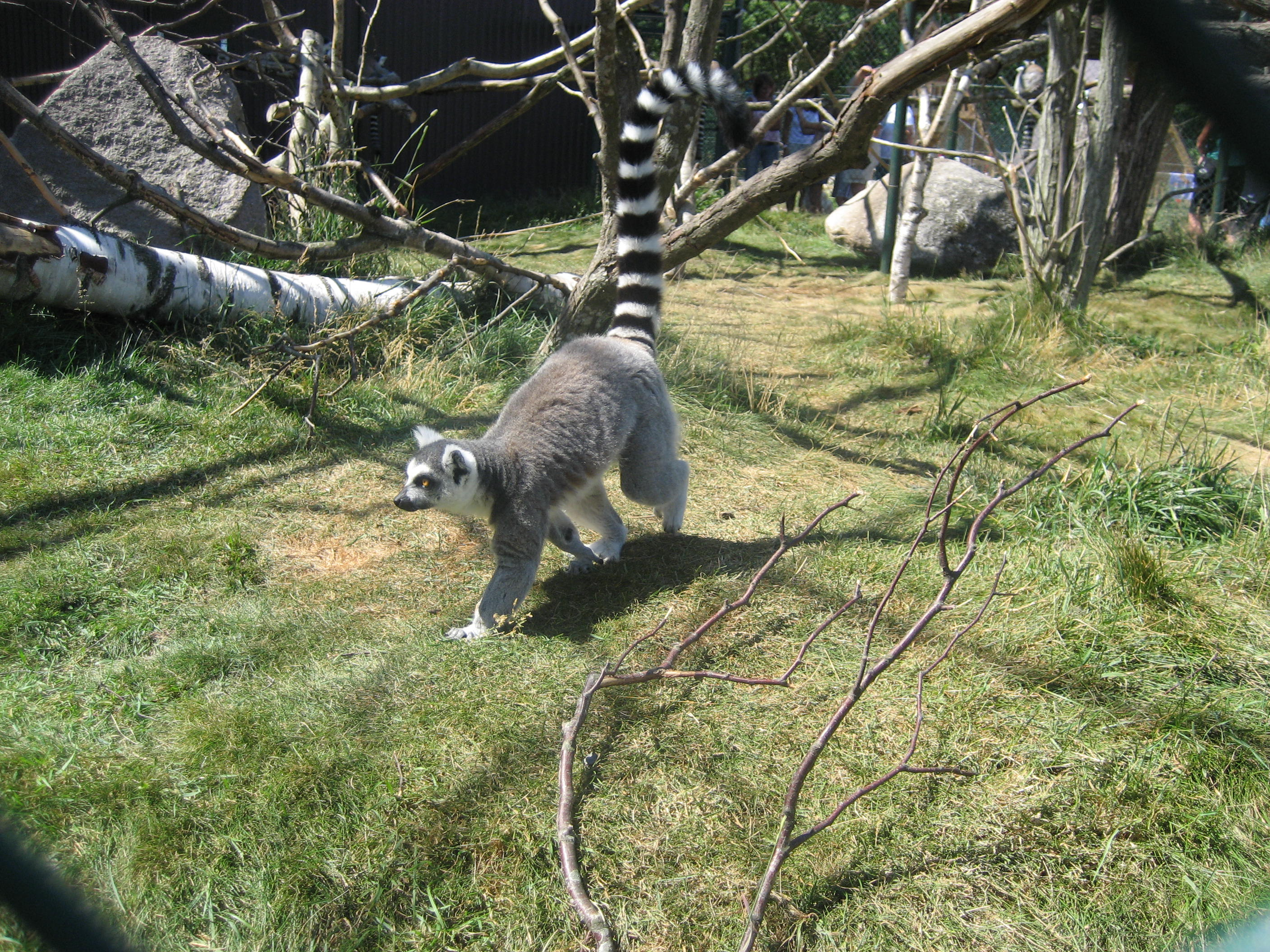 A walking Lemur.